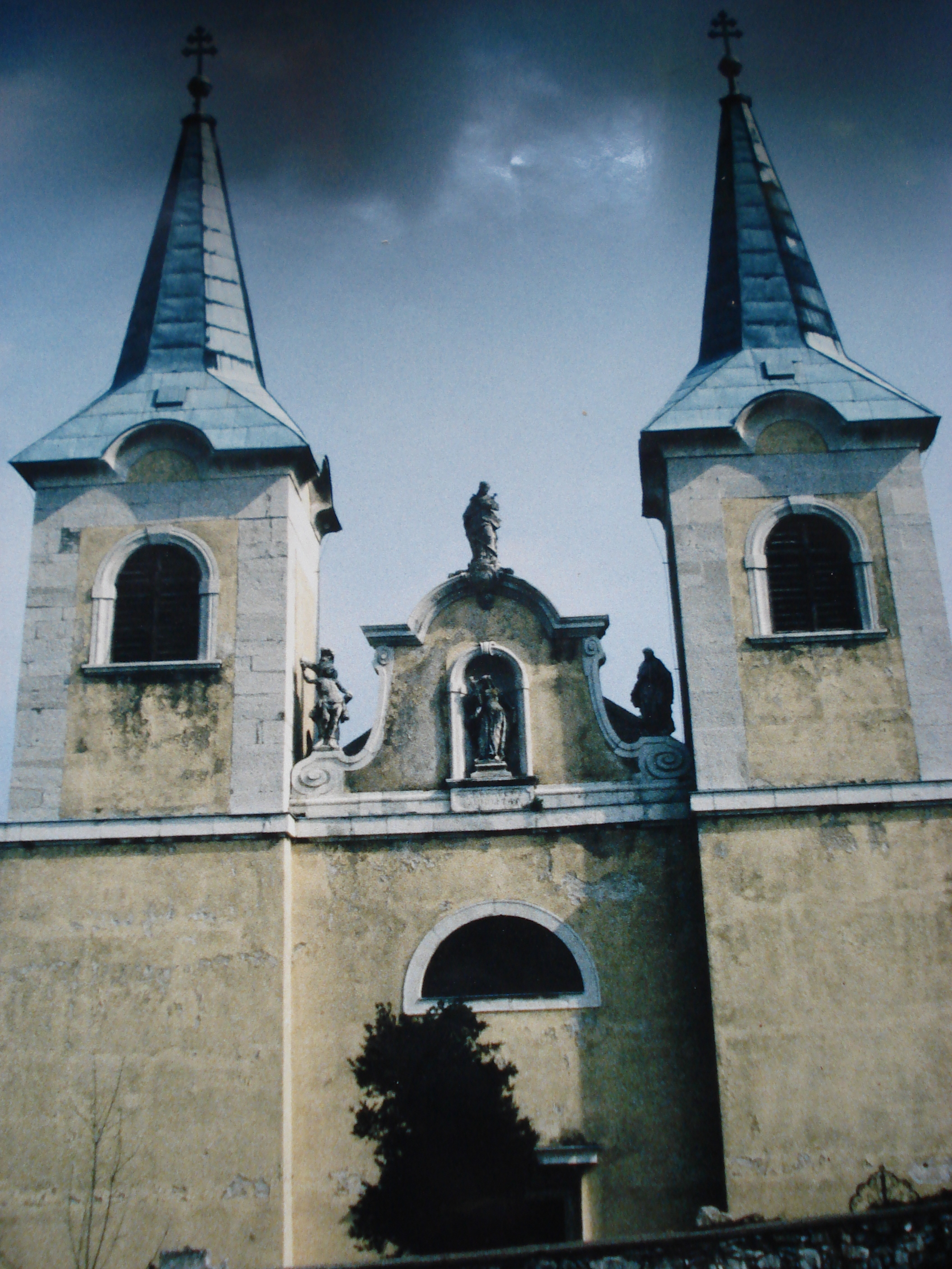 Kaisersteinbrucher Kirche in den 1980er Jahren, also vor der Restaurierung 1991 aufgenommen.